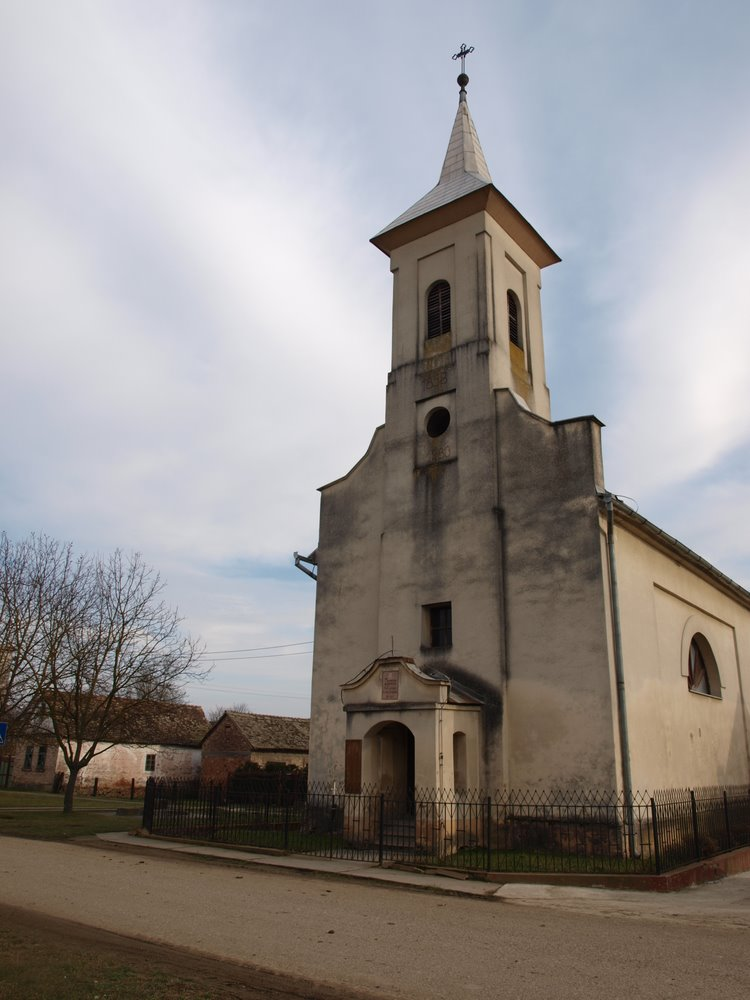 Crkva u Stupnički Kuti, Brodsko-posavska županija.